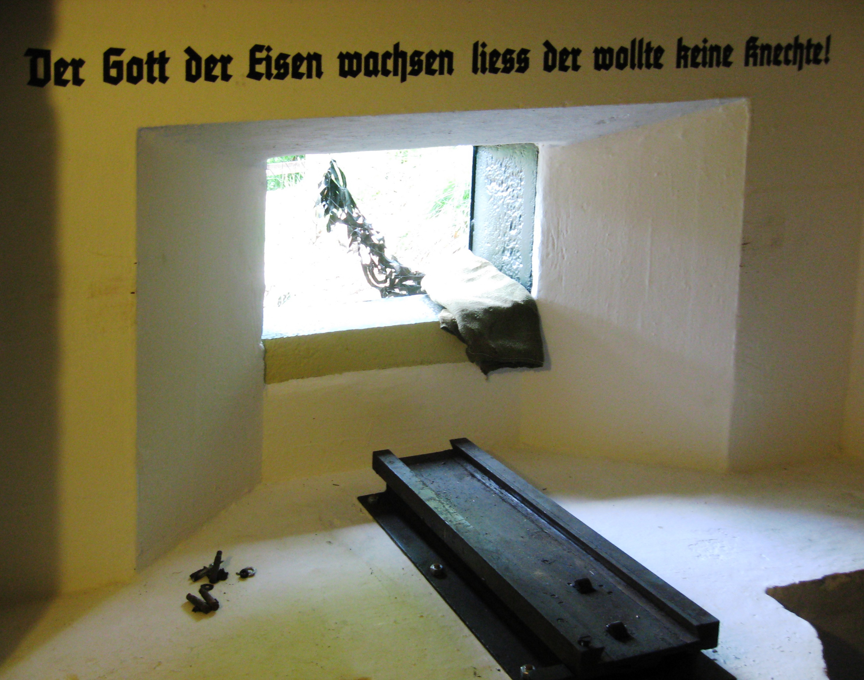 Bunker 2. WK bei Haustadt